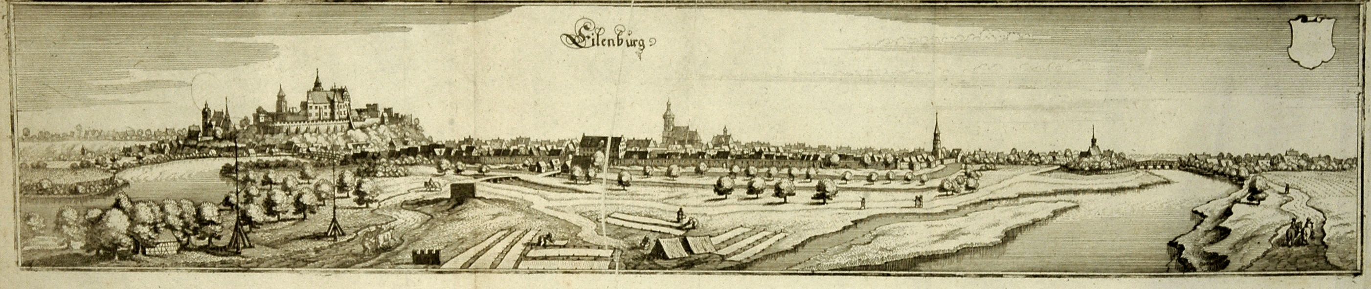 Eilenburg um 1650; Kupferstich 10 x 50 cm von Matthäus Merian 1647